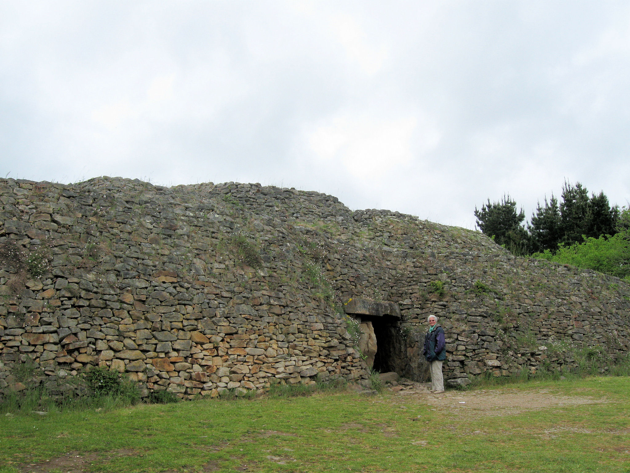 Cairn von Gavrinis, Dolmenzugang